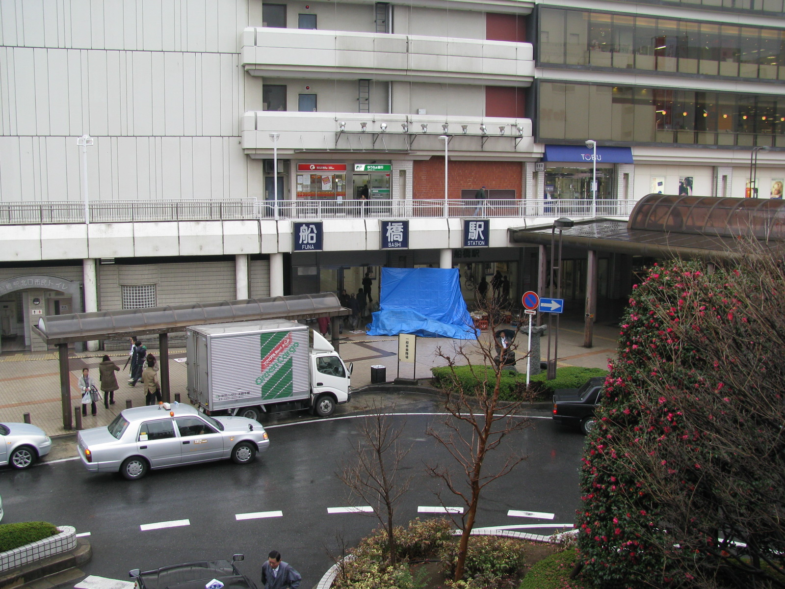 JR船橋駅